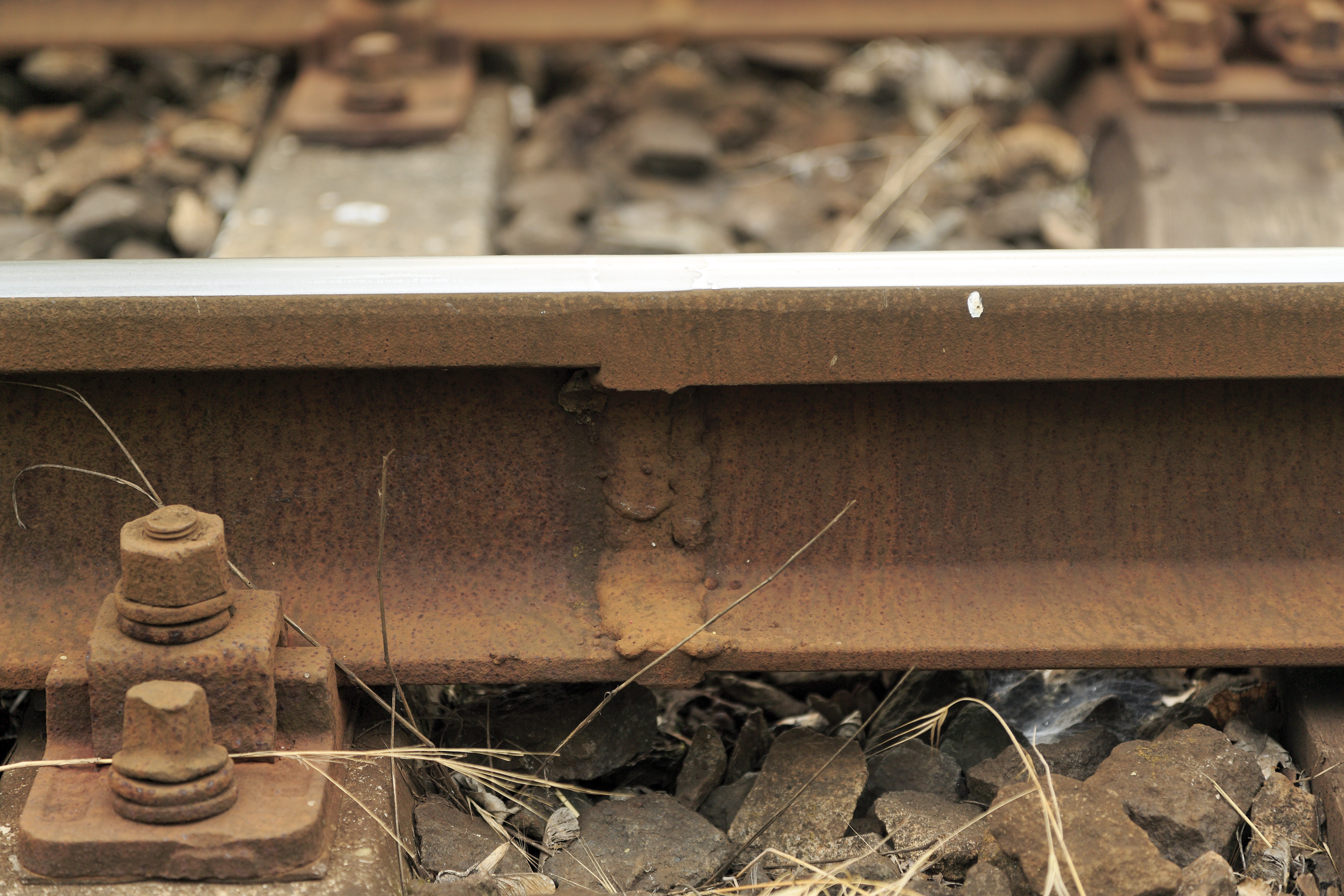 Bogendreieck am Kreiskrankenhaus, »Tabarzer Spitze«. Im Gleis (links) liegt das Schienenprofil R 50, mit dem in Deutschland keine Weichen konstruiert wurden. Die Weiche (rechts) wurde mit dem deutschen Regelprofil S 49 ausgerüstet. Die Übergangsschweißung erfolgte elektrisch.